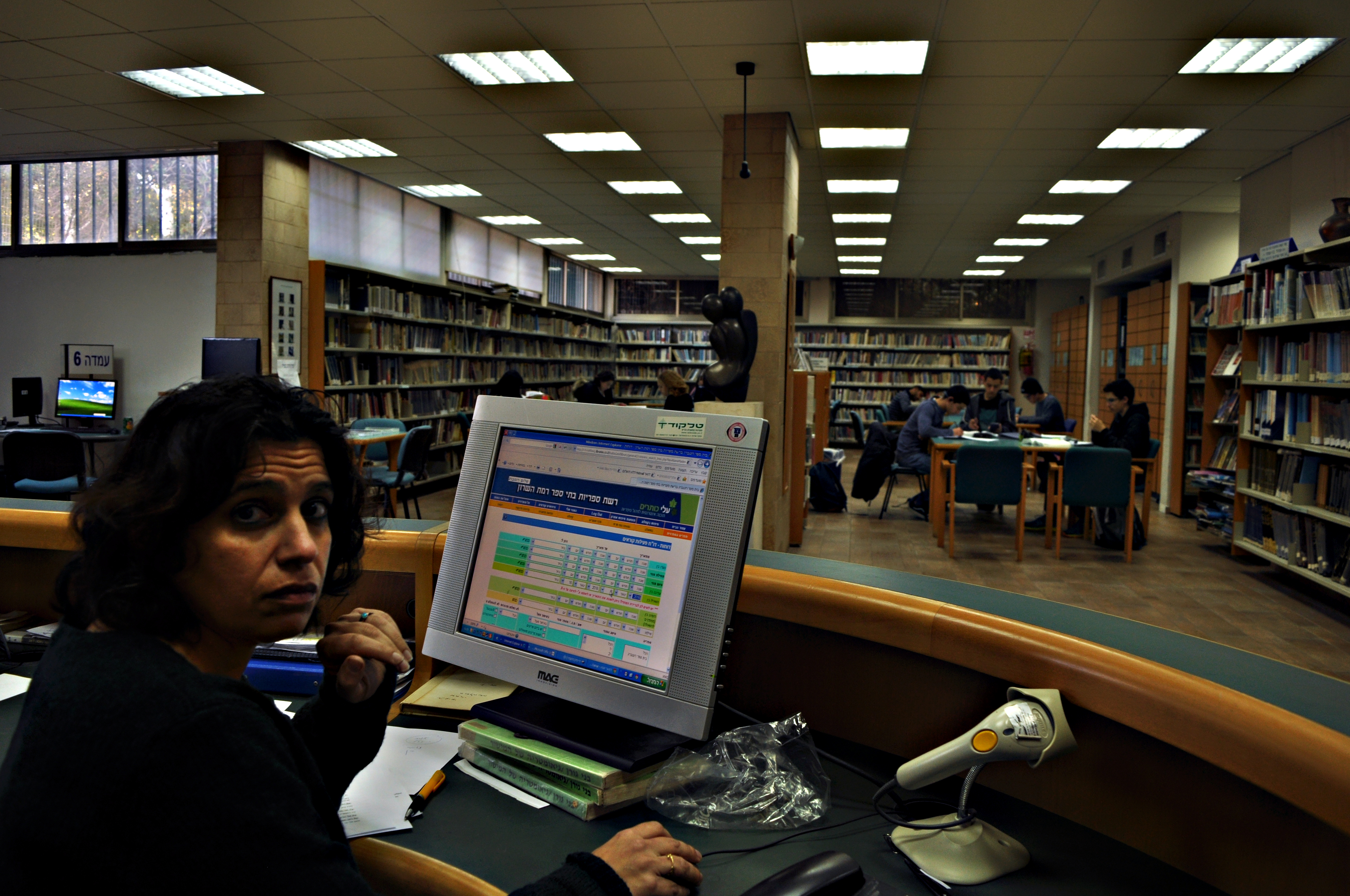 תמר חסון דלל ספרנית ספריית תיכון רוטברג